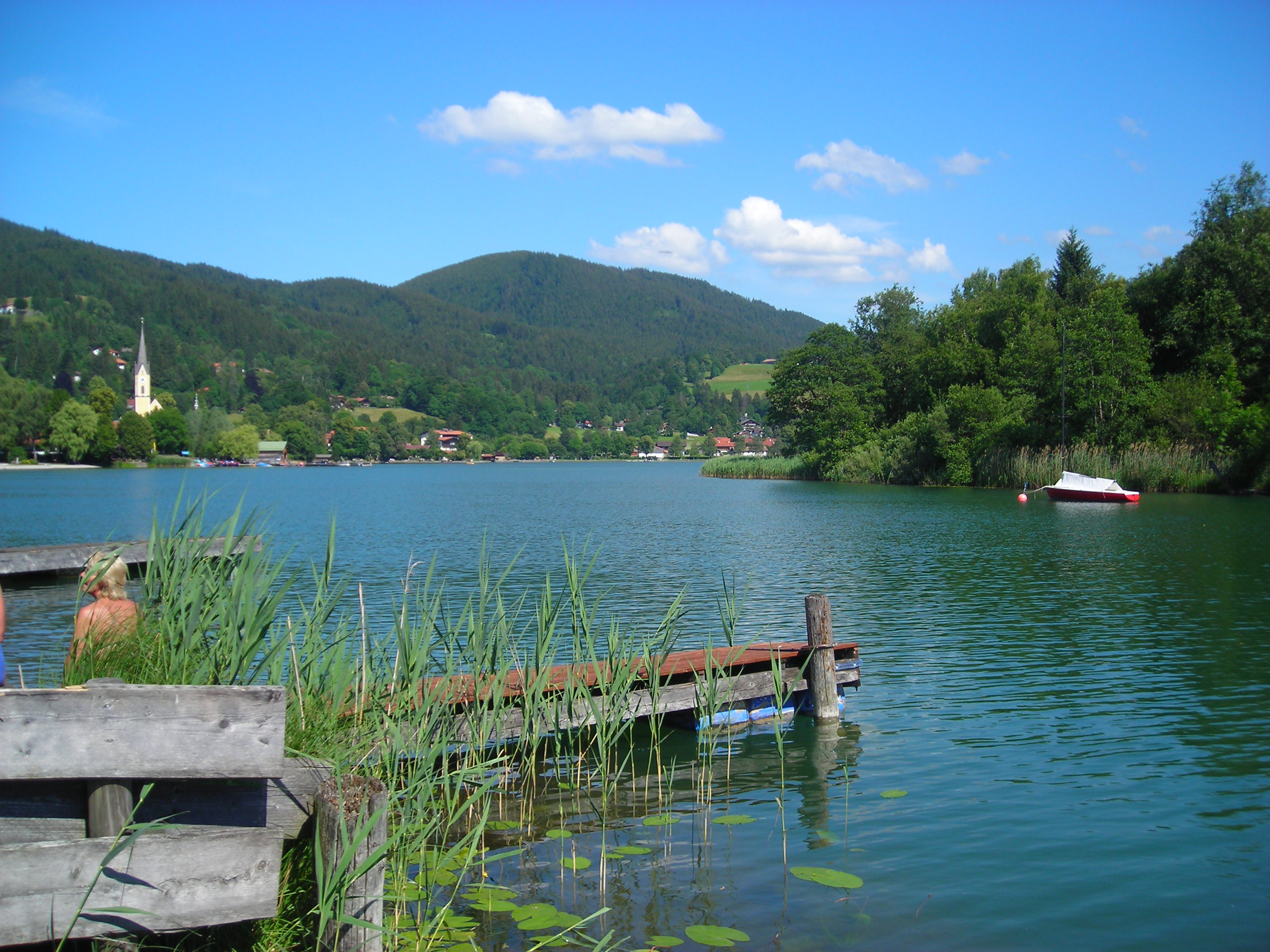 Der Schliersee (Bayern), Blick nach Südosten